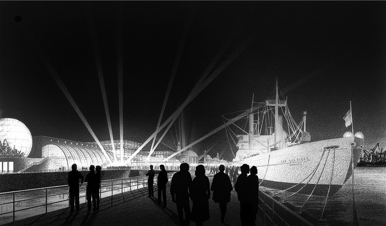 1988. Bleistiftzeichnung zum Projekt Kinozentrum Hamburger Landungsbrücken. Architekten: GMP von Gerkan, Marg und Partner